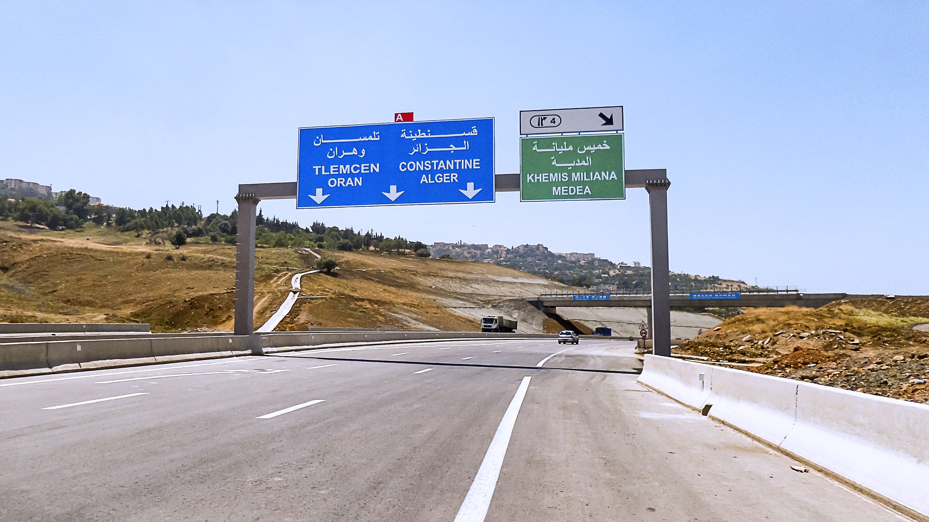 Algérie - Médéa - Autoroute Nord-Sud المدية - الطريق السريع شمال جنوب